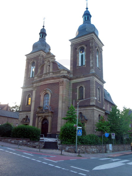 katholische Pfarrkirche St. Mariae Himmelfahrt in Herzogenrath, Nordrhein-Westfalen, Deutschland; errichtet 1913-1914 nach Entwurf von Heinrich van Kann; unter Denkmalschutz (Denkmal-Nr. 000097-01)